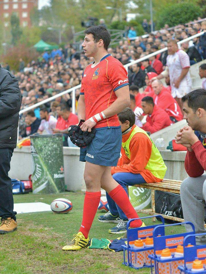 Alvar Gimeno con España